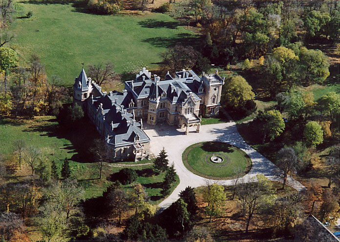 Palace - Nádasdladány - Hungary - Europe